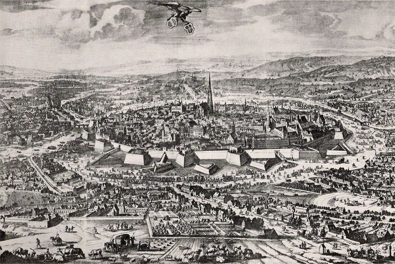 Ausschnitt aus der Vogelschau der Stadt Wien und Umgebung 1683 (1686).